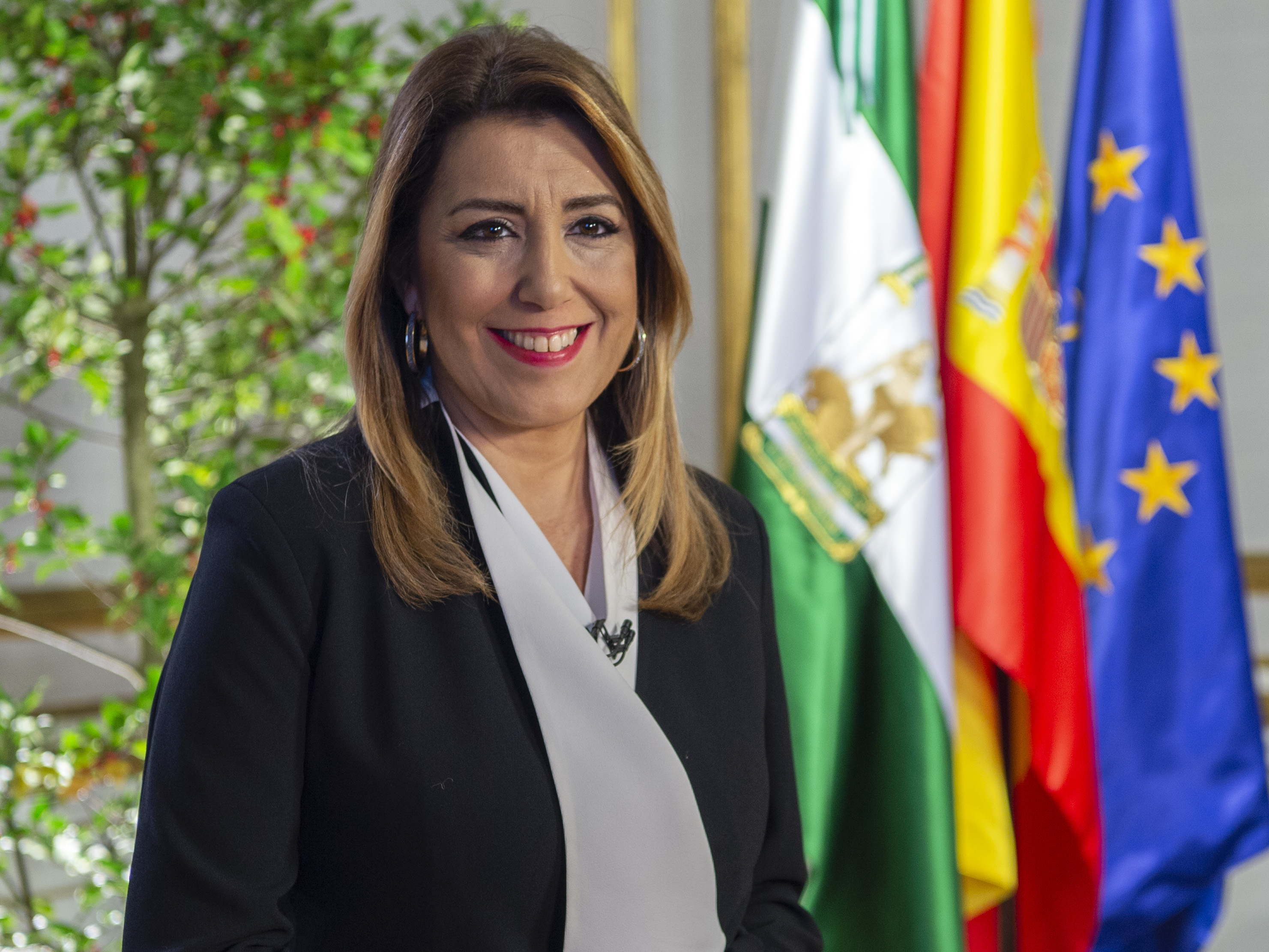 La presidenta de la Junta en funciones, Susana Díaz, durante su mensaje de Fin de Año.